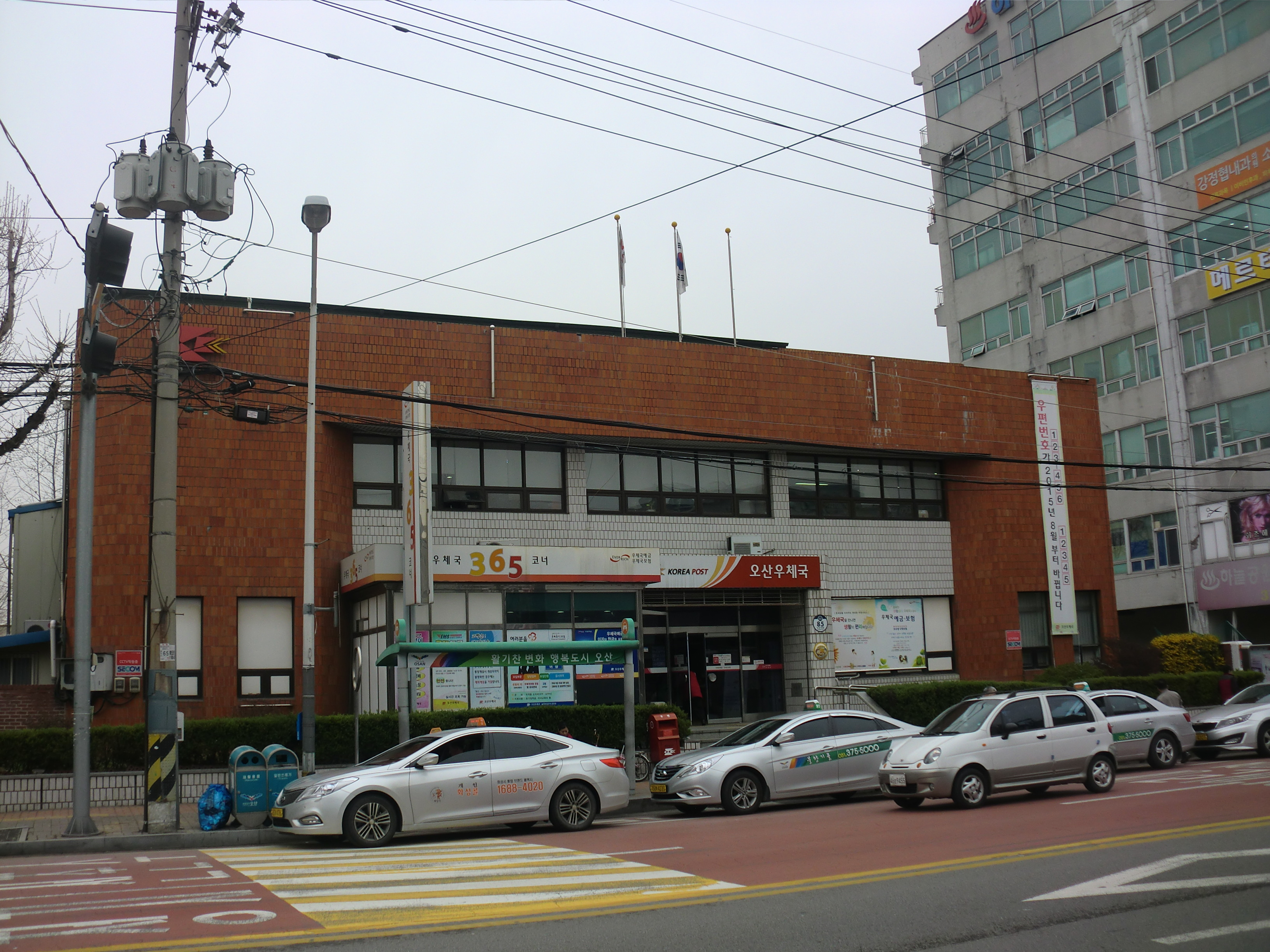 경기도 오산시에 있는 오산우체국